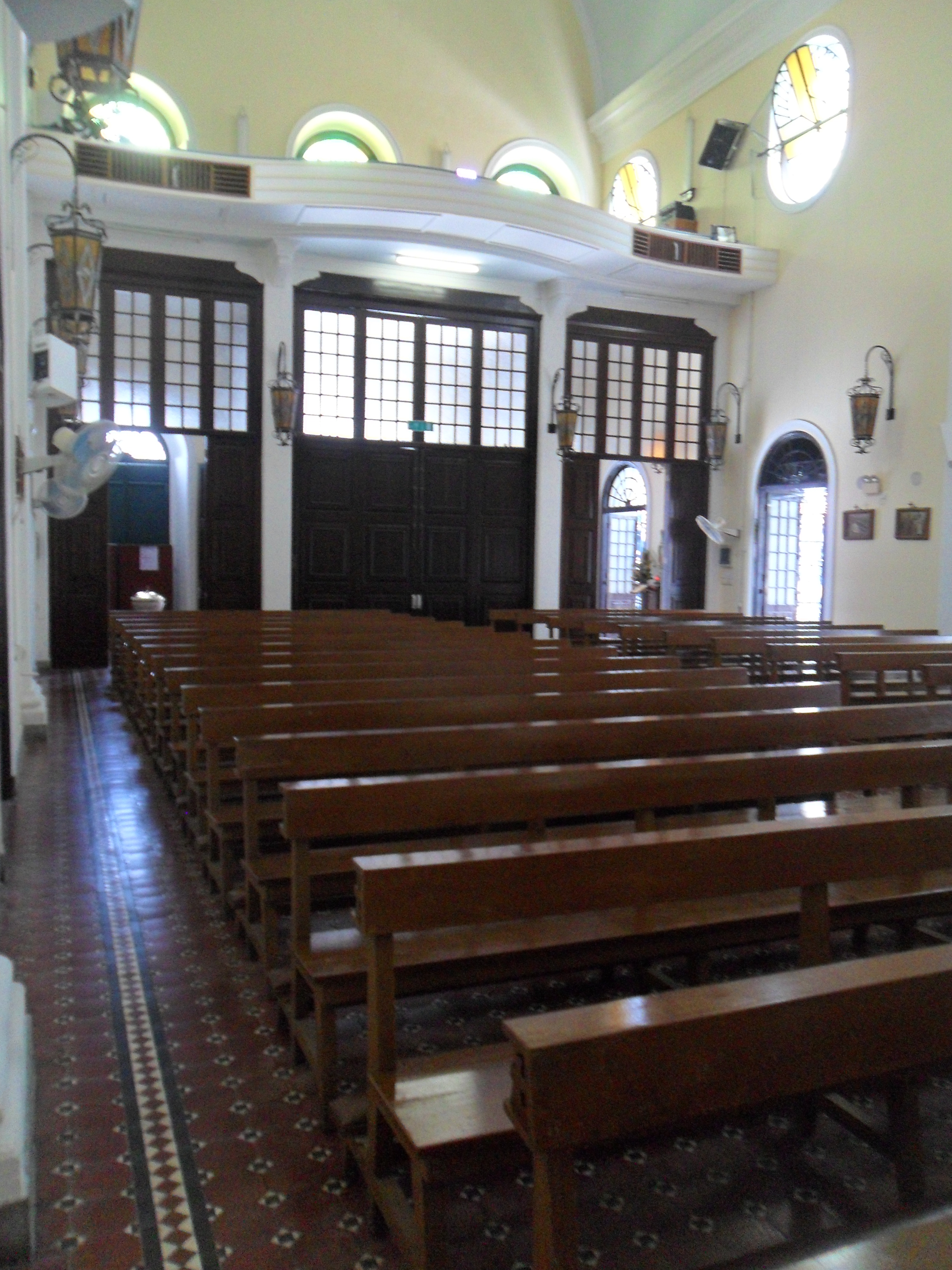 中文（香港）: 望德聖母堂, 澳門, 中國